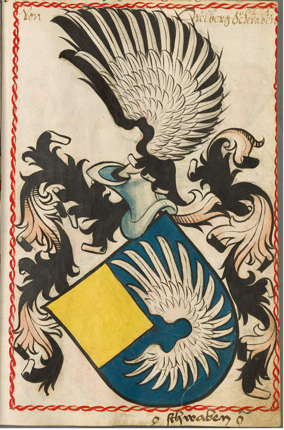 Scheibler'sches Wappenbuch, älterer Teil; Seite 241 Von Welberg Schwaben